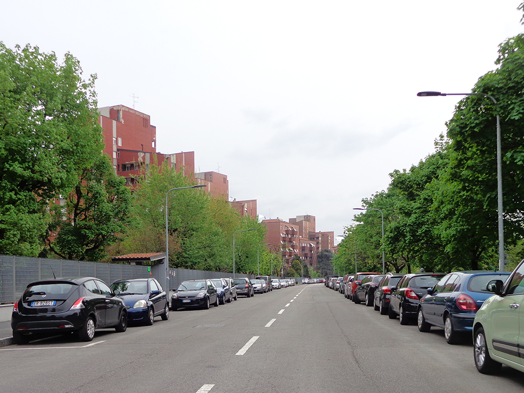 Milano, via Valsesia.